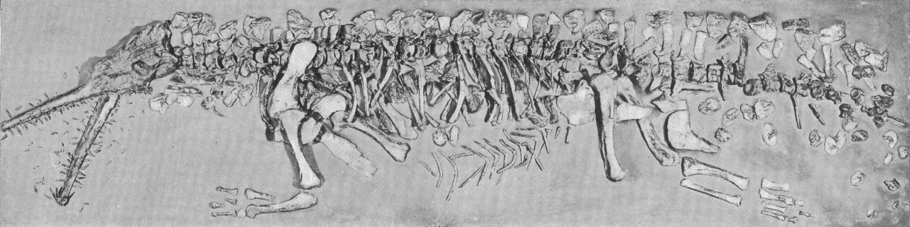 Rutiodon carolinensis fossil